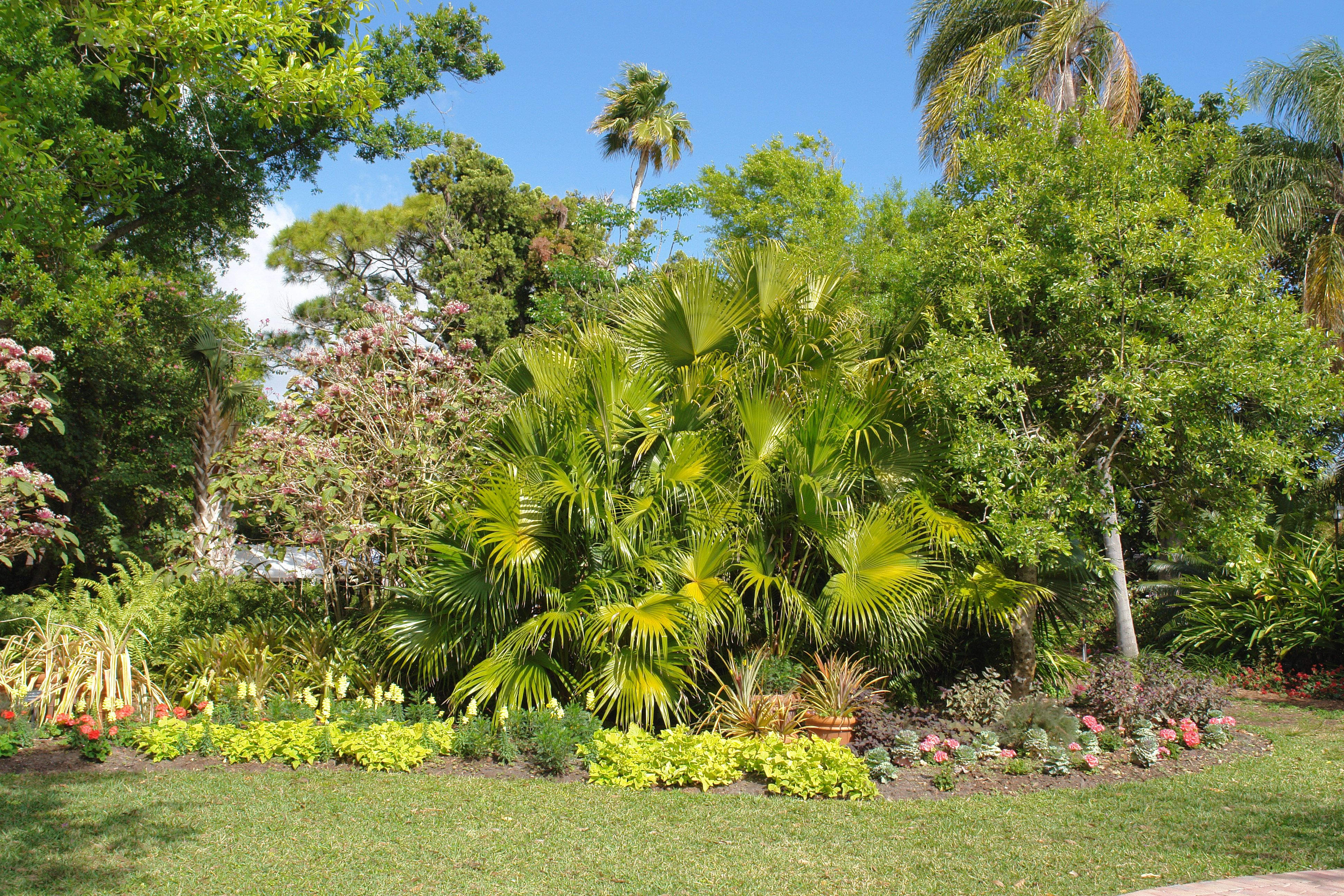 Fort Pierce, Florida: Botanical garden.